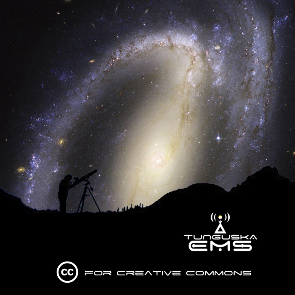 Обложка альбома "Tunguska E.M.S. for Creative Commons", изданного под CC-BY-SA 3.0